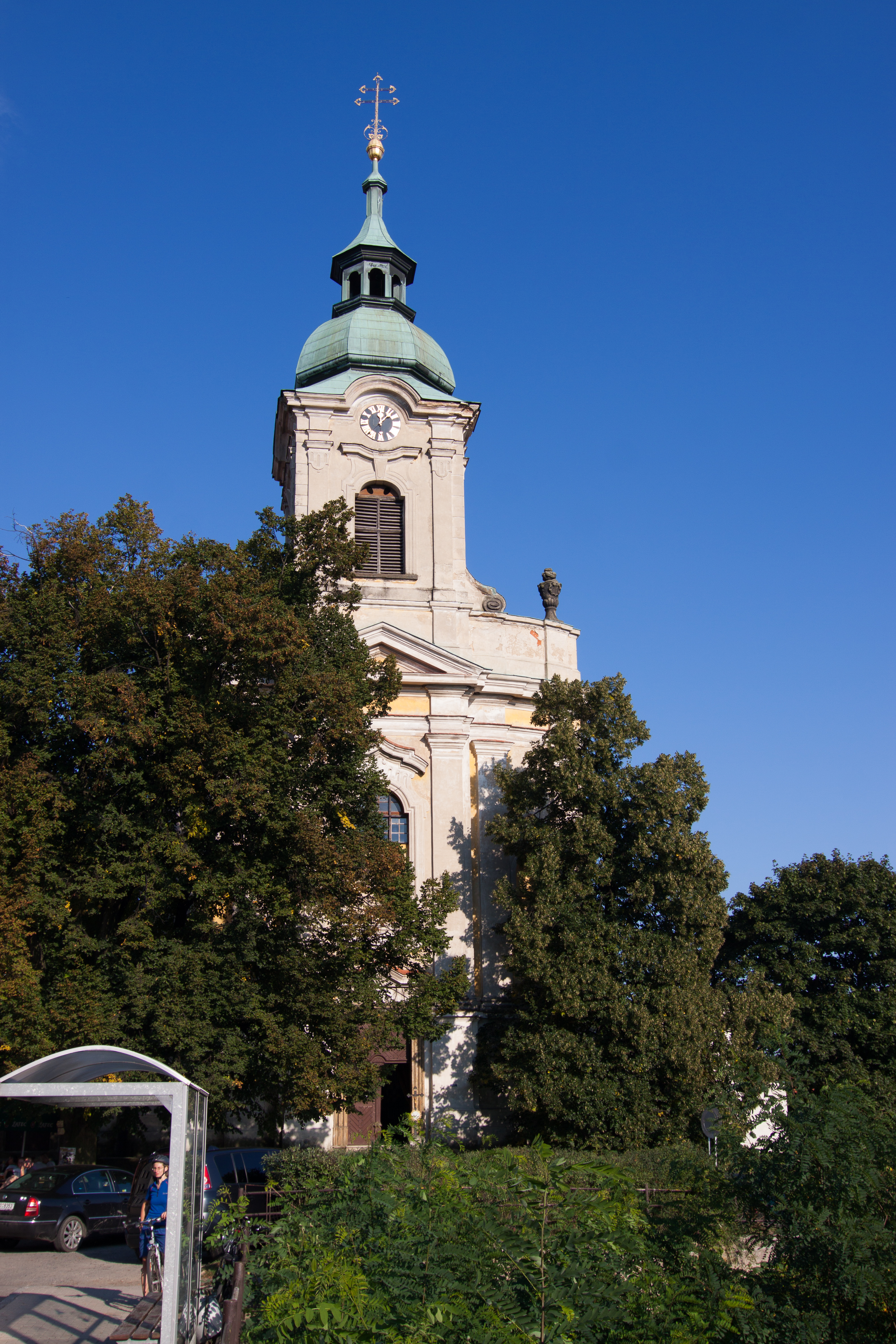 Kostel sv. Václava, náves, Vysoká, okres Mělník.